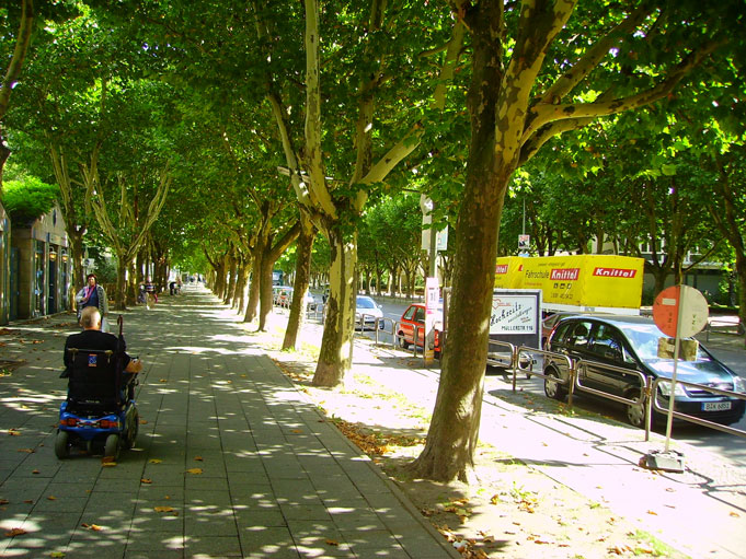 Bürgersteig des als Allee angelegten Wilhelmsruher Damms im Zentrum des Märkischen Viertels im Berliner Bezirk Reinickendorf